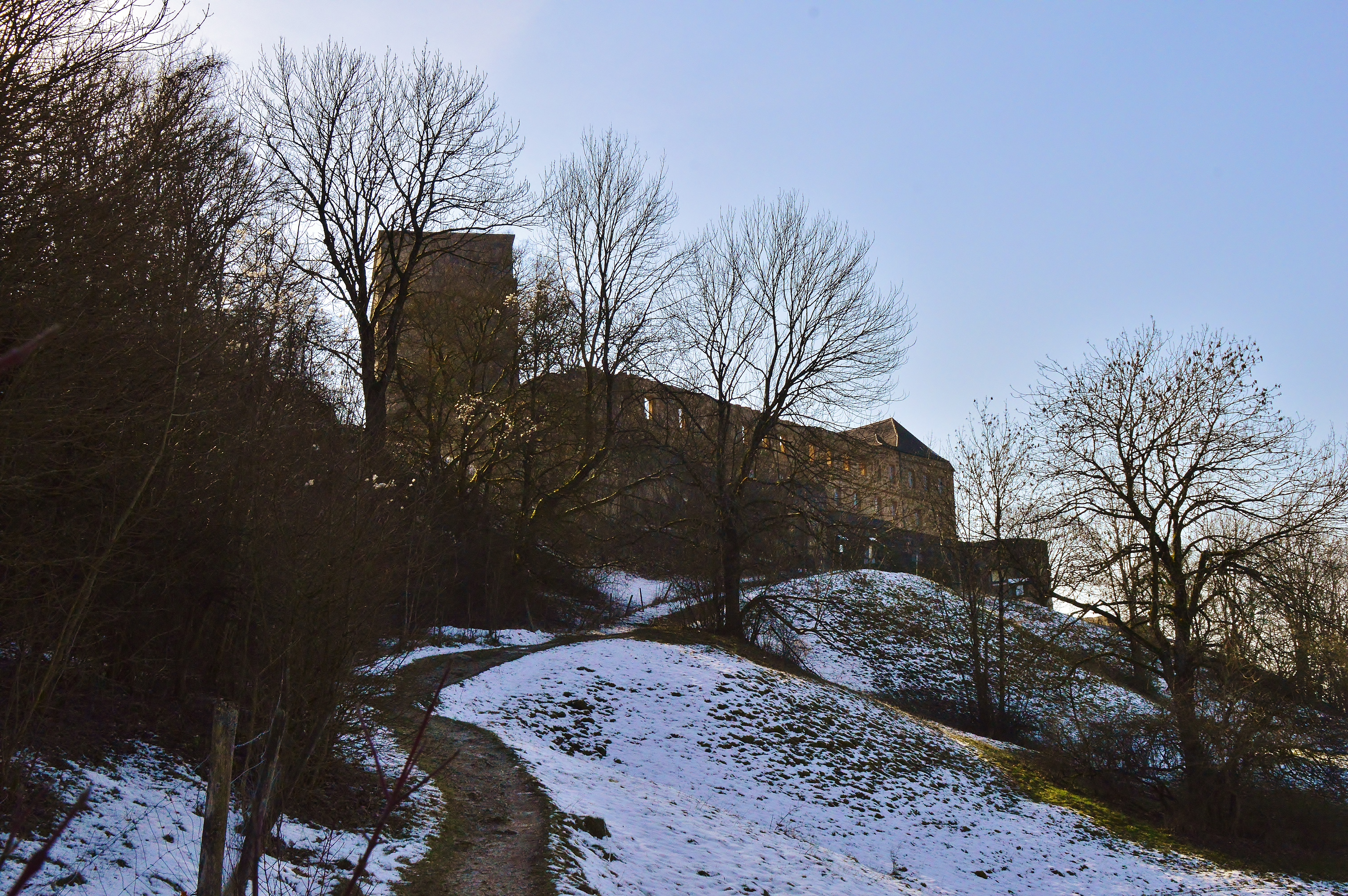 Giechburg bei Scheßlitz im Landkreis Bamberg im Winter